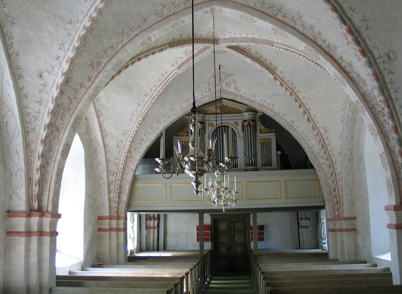 Ekebyborna kyrka.Valvbågar.